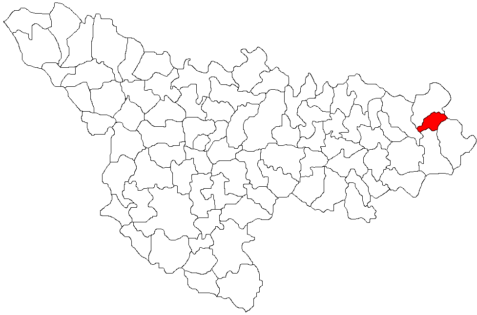 Curtea, Timis Licensing Categorie:Hărţi ale judeţului Timiş